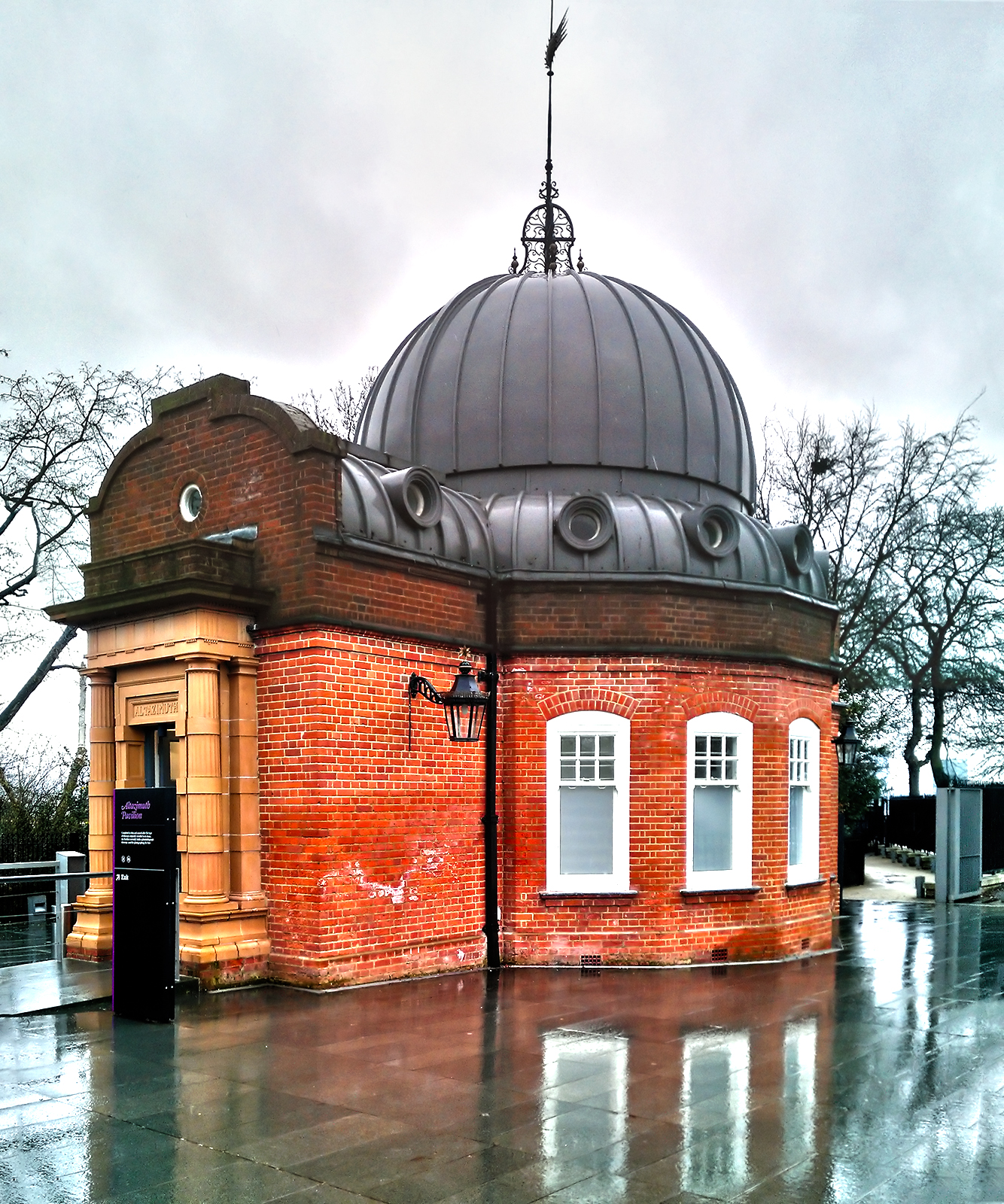 Altazimuth Pavilion